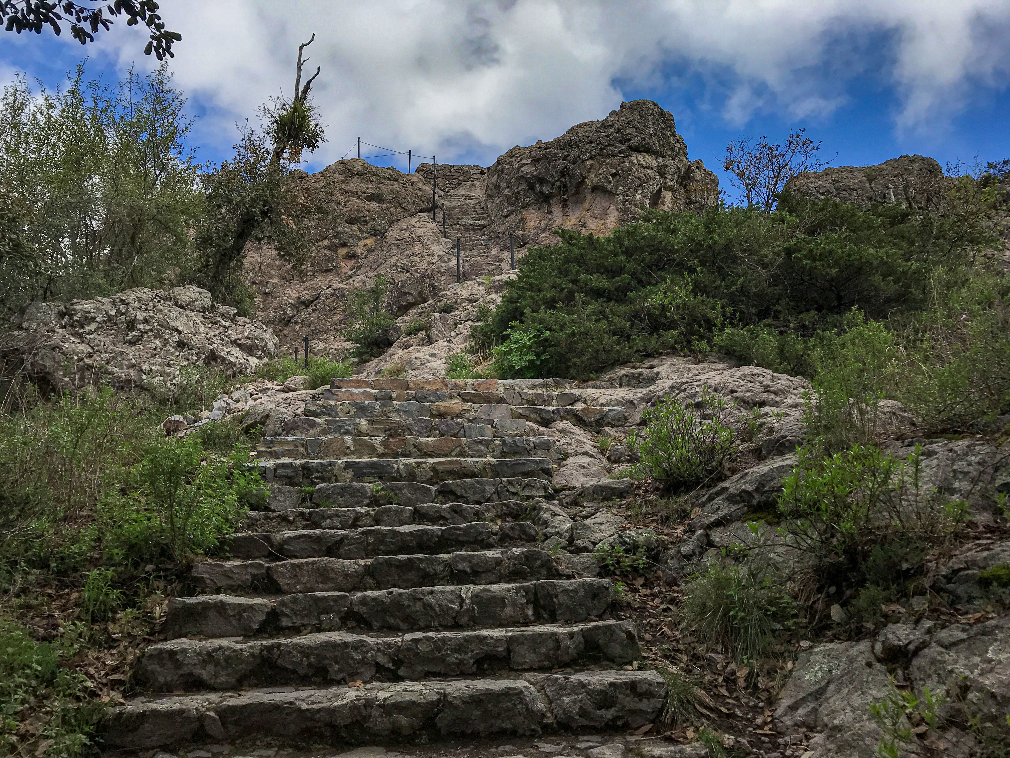 Escaleras al mirador Peña del cuervo en el Parque nacional El Chico